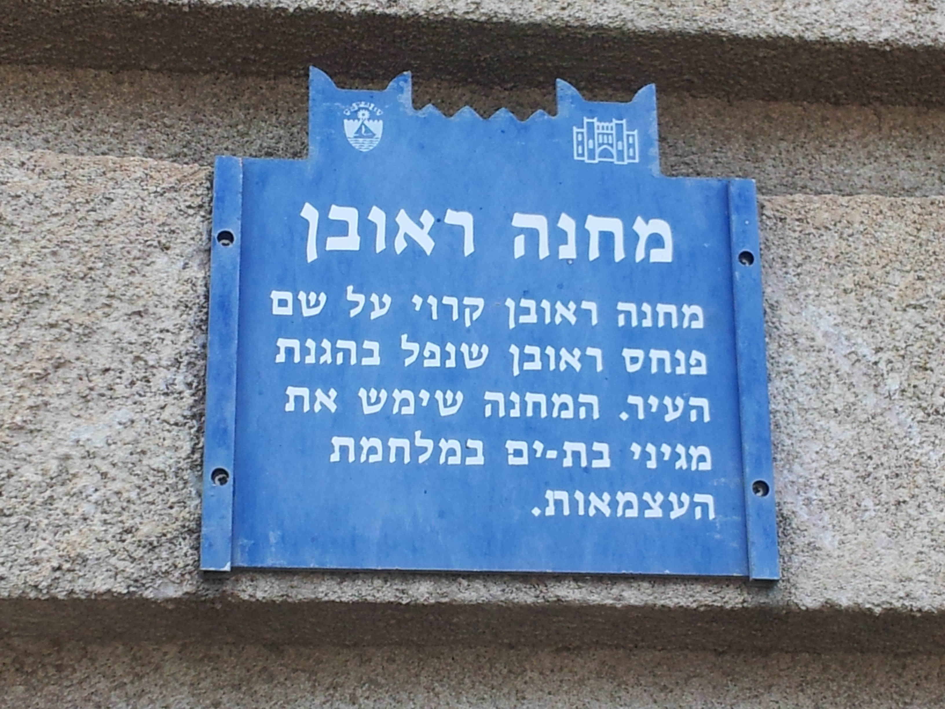 שלט הנצחה מחנה ראובן, בת ים.